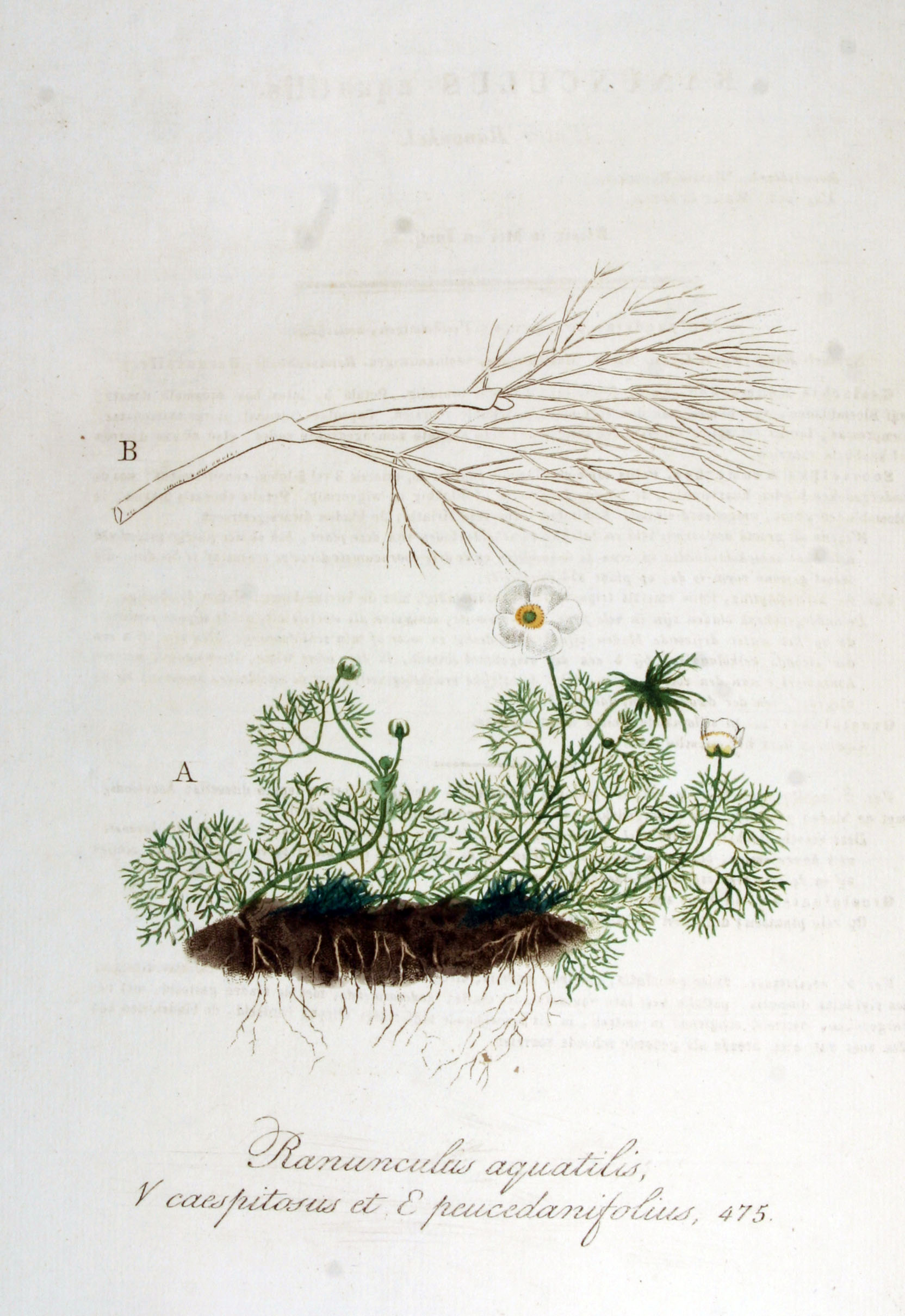 A. Ranunculus aquatilis L. - B. Ranunculus penicillatus (Dum.) Bab.